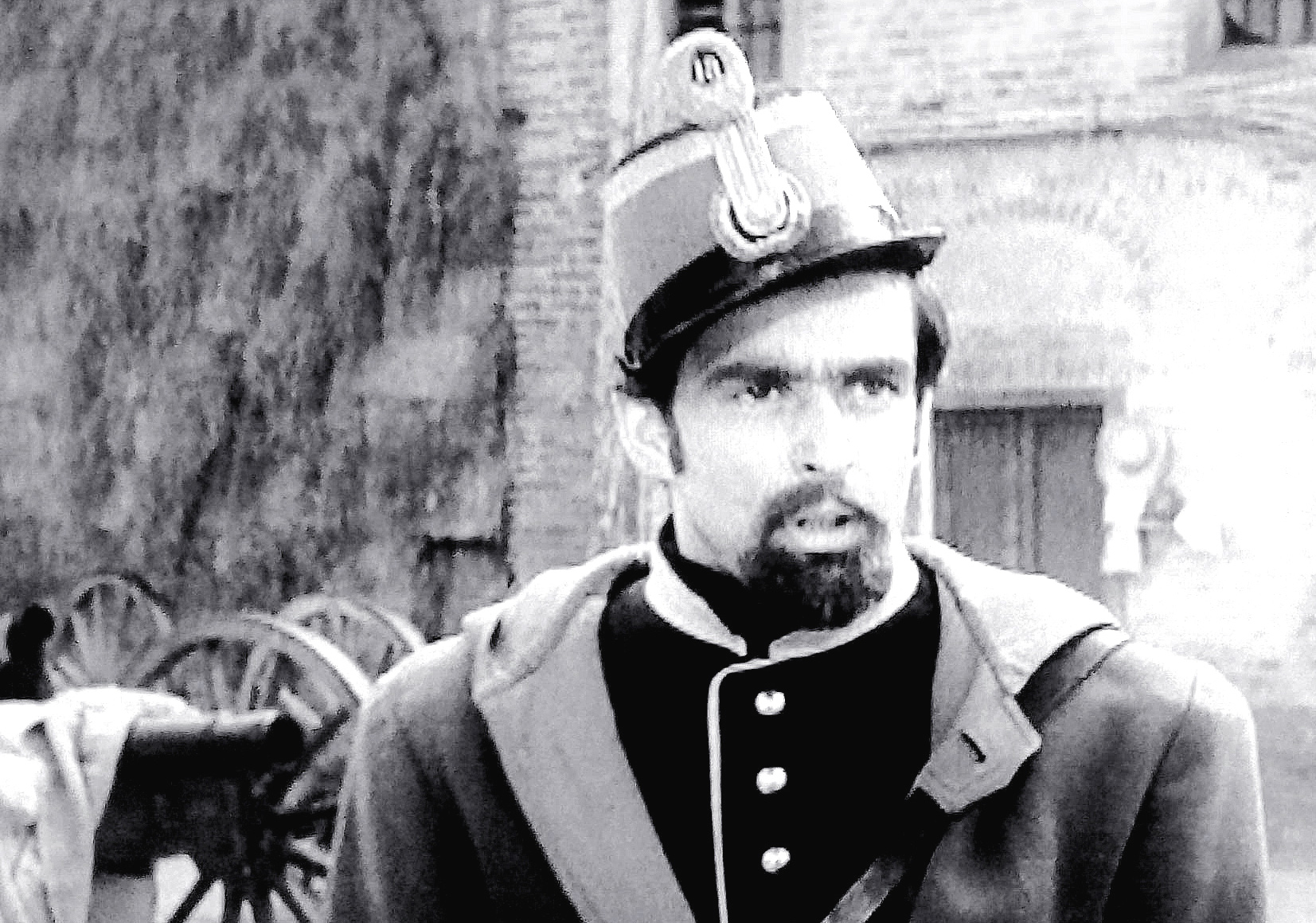 La pattuglia sperduta (Nelli, 1954) foto scena